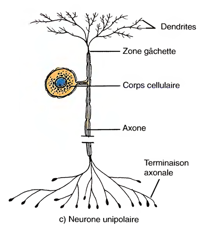 Schéma représentatif d'un neurone unipolaire